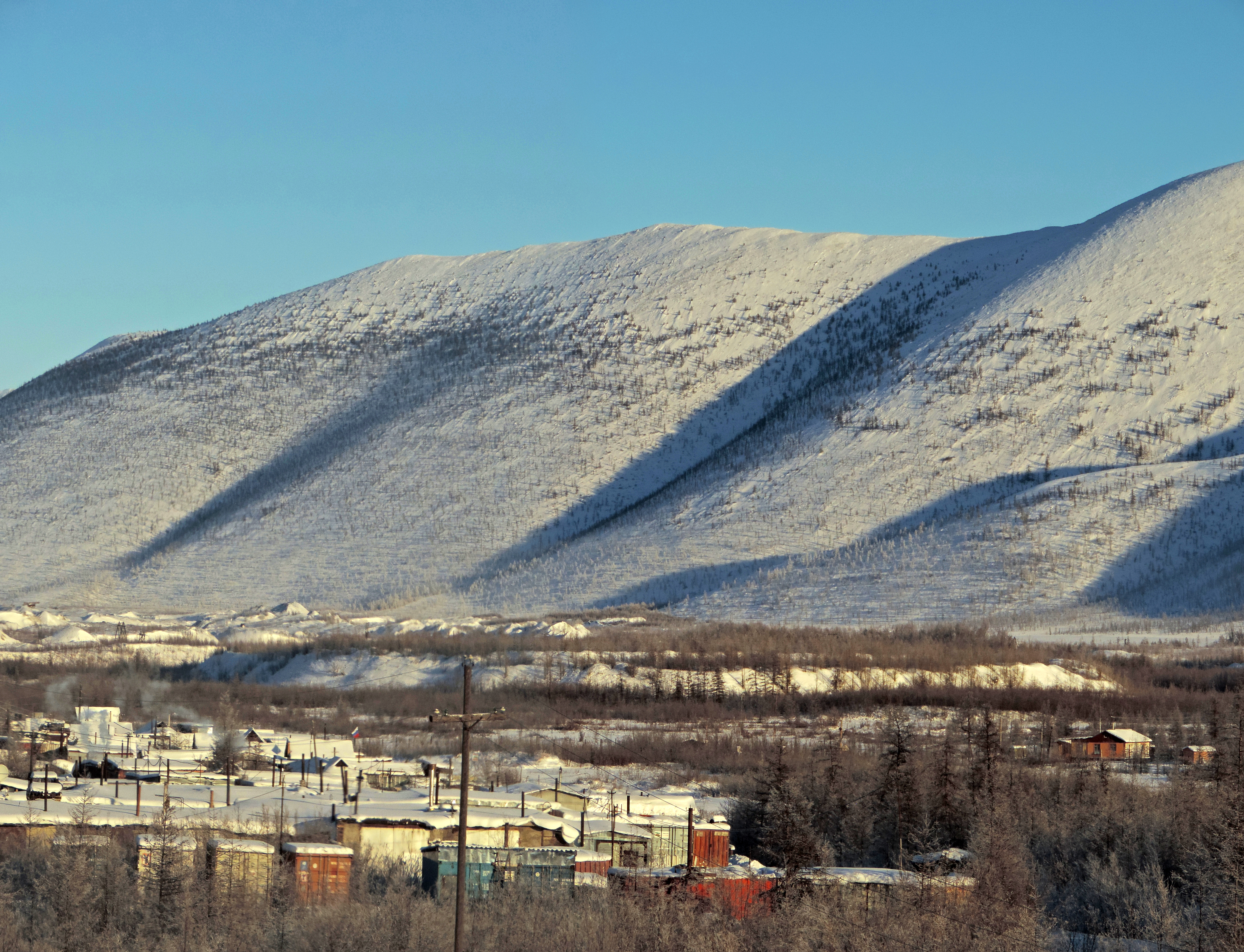 Bilibinsky District, Chukotka Autonomous Okrug, Russia